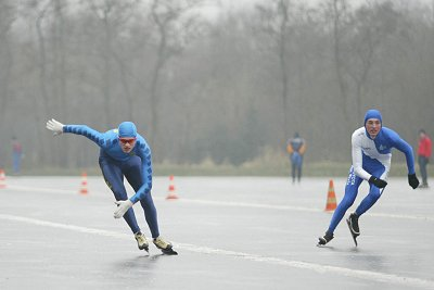 Kortebaanschaatsen